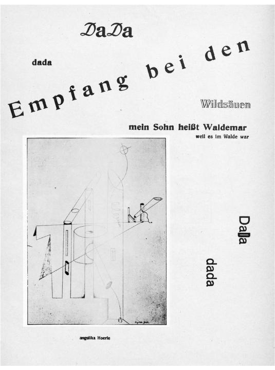 Ilustración en Die Schammade, de Angelika Hoerle.